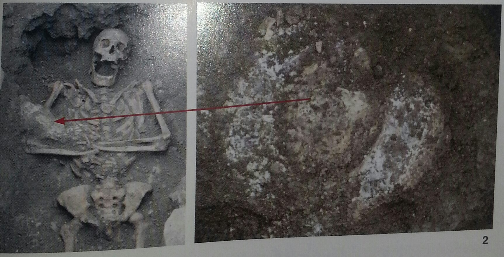 resti umani nunziatella